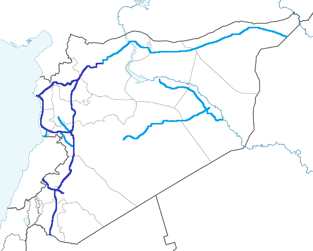 la carte des autoroutes syriennes